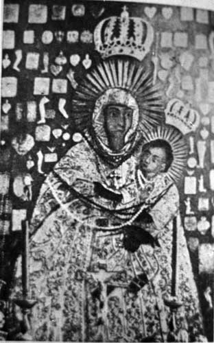 Mаці Божая Падхорная XVIII ст. З касцёла кармелітаў у г. Глыбокае. (здымак- пачатак ХХ ст.)